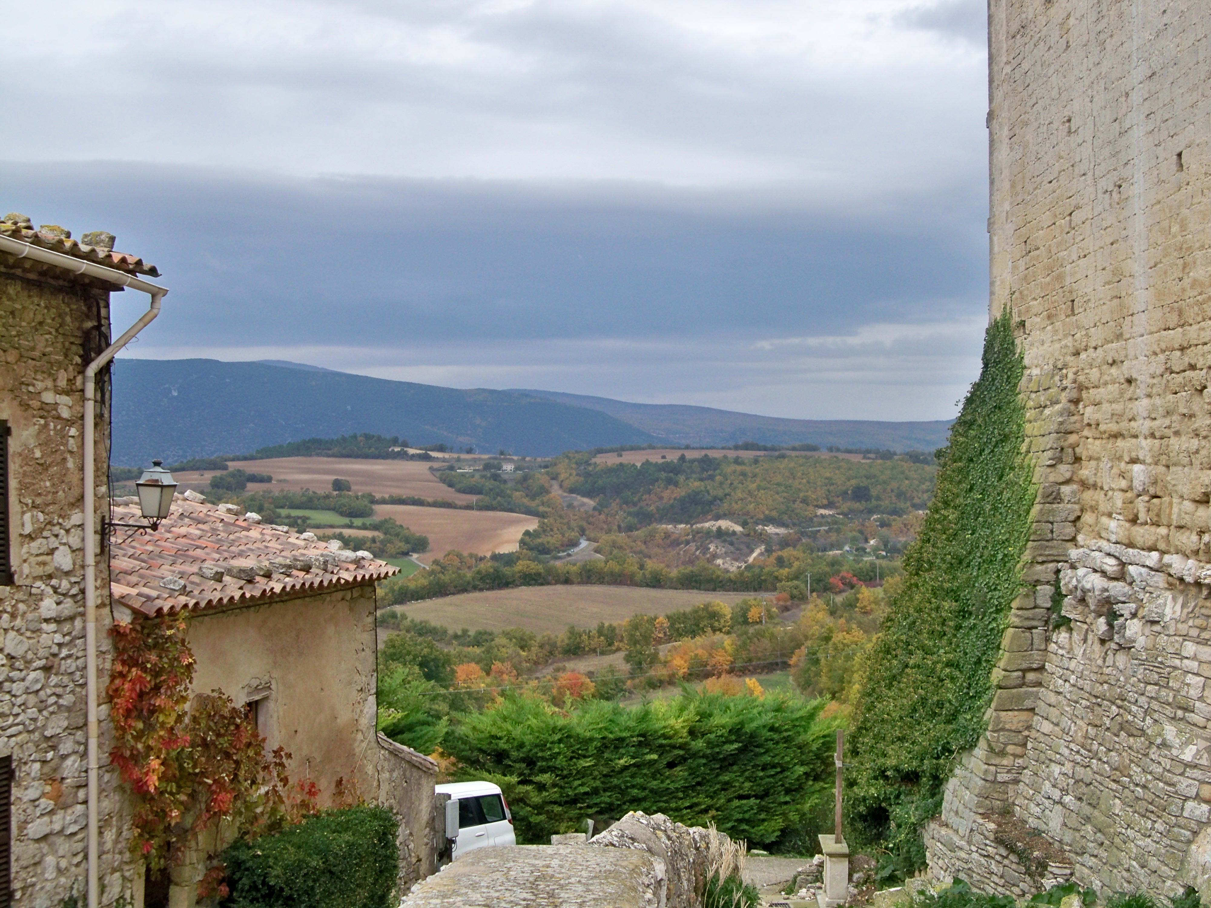 Paysage vue de Caseneuve (Vaucluse, France)